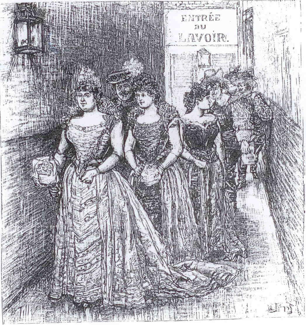 "La reine et son cortège." Tel est le sous-titre d'origine de ce dessin figurant la reine d'un lavoir parisien élue pour la Mi-Carême, Fête des Blanchisseuses 1891.